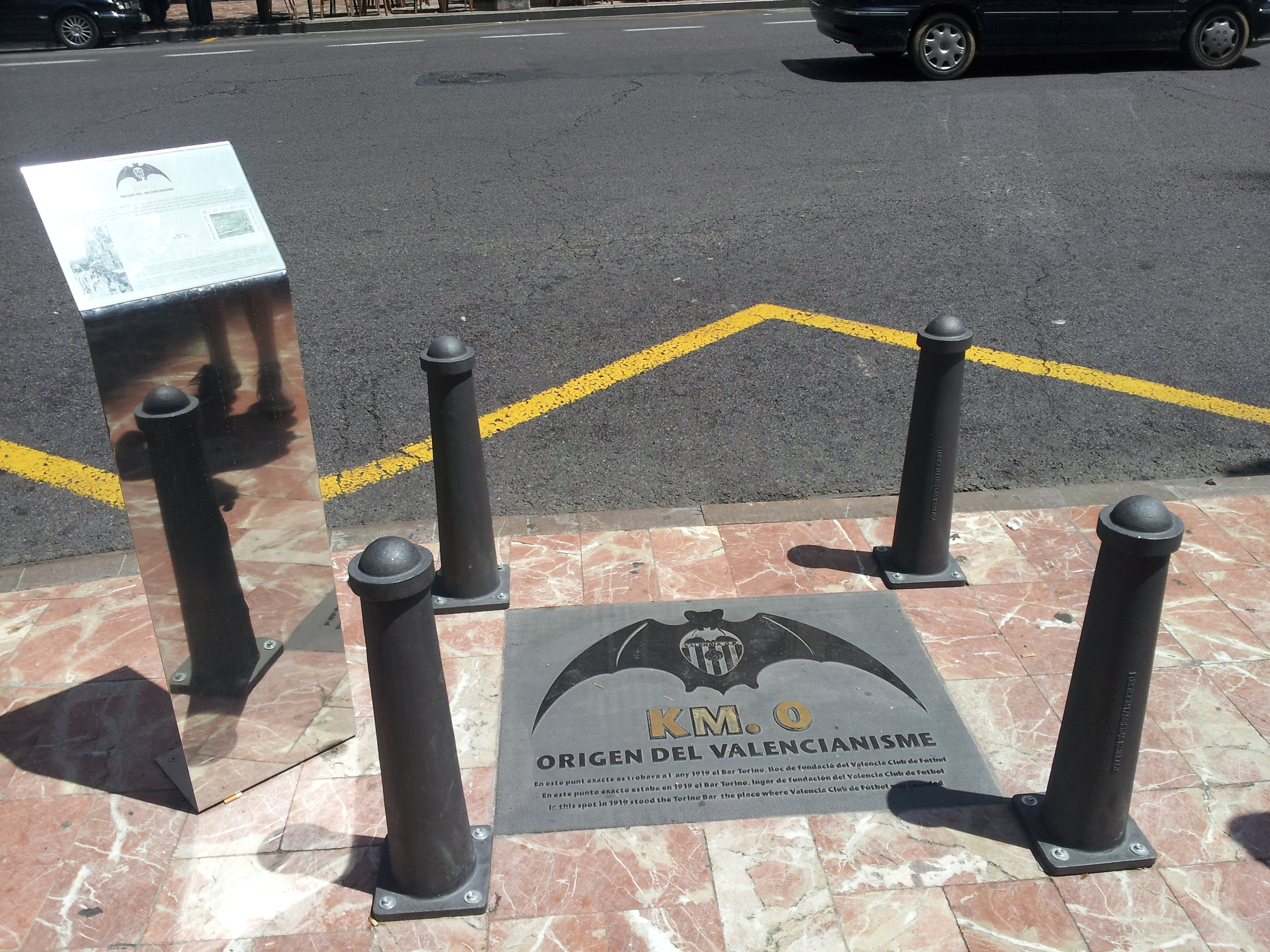 Placa homenatge al lloc on es trobava el Bar Torino (Antiga Baixada de Sant Francesc) lloc de fundació del València CF